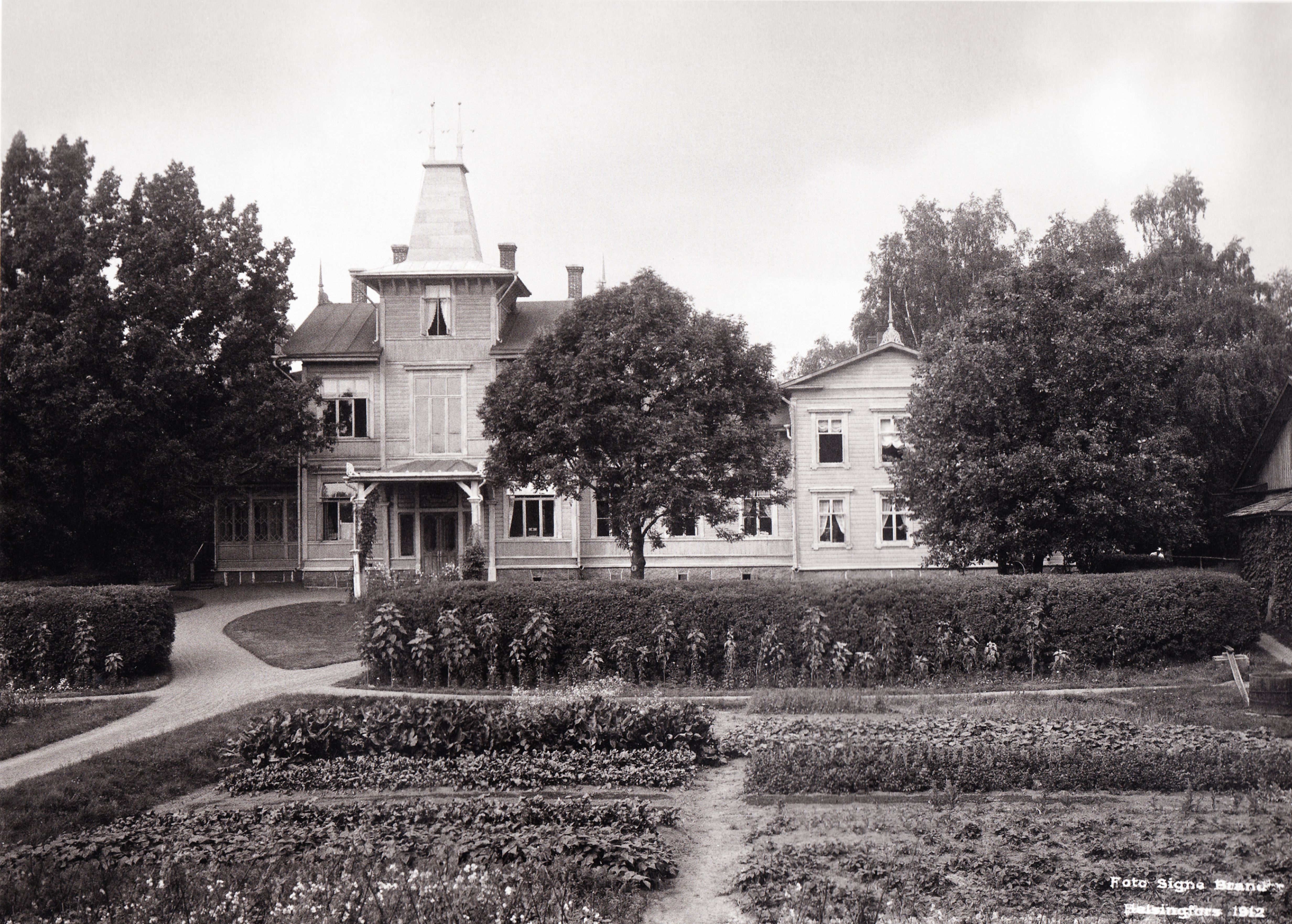 Summan kartano